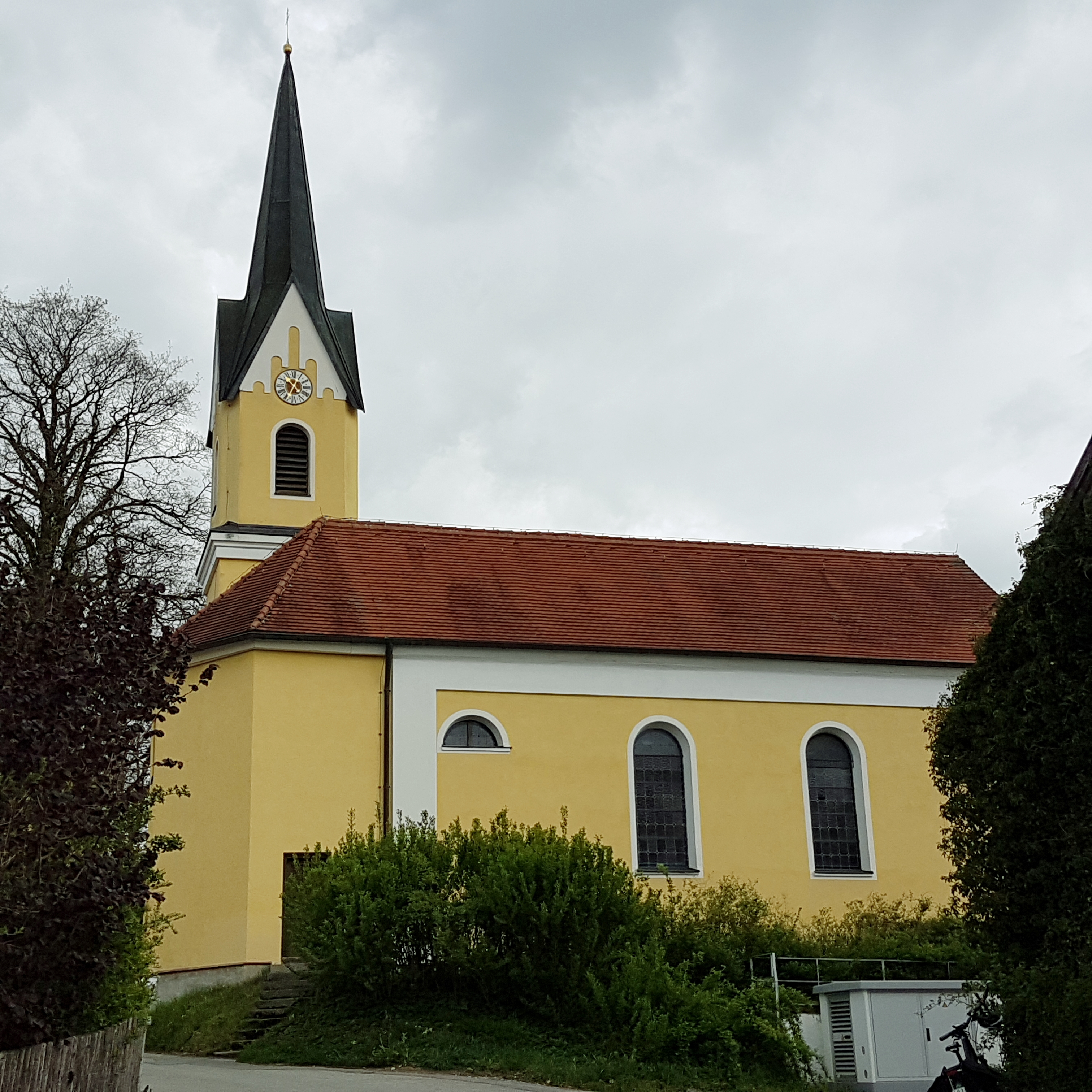 Nantesbuch (Penzberg), Mariä Himmelfahrt